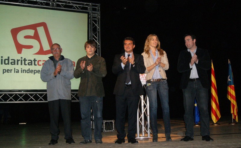 Joan Laporta, Anna Arqué i Uriel Bertran en un acte de campanya de Solidaritat Catalana per la Independència (SI) a les eleccions al Parlament de Catalunya 2010.